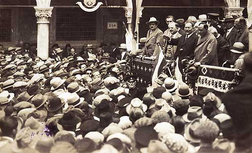 Stjepan Radić govori na skupštinskom zborovanju u Dubrovniku 27. svibnja 1928. godine. Desno od Radića je Josip Predavec a lijevo Svetozar Pribićević.